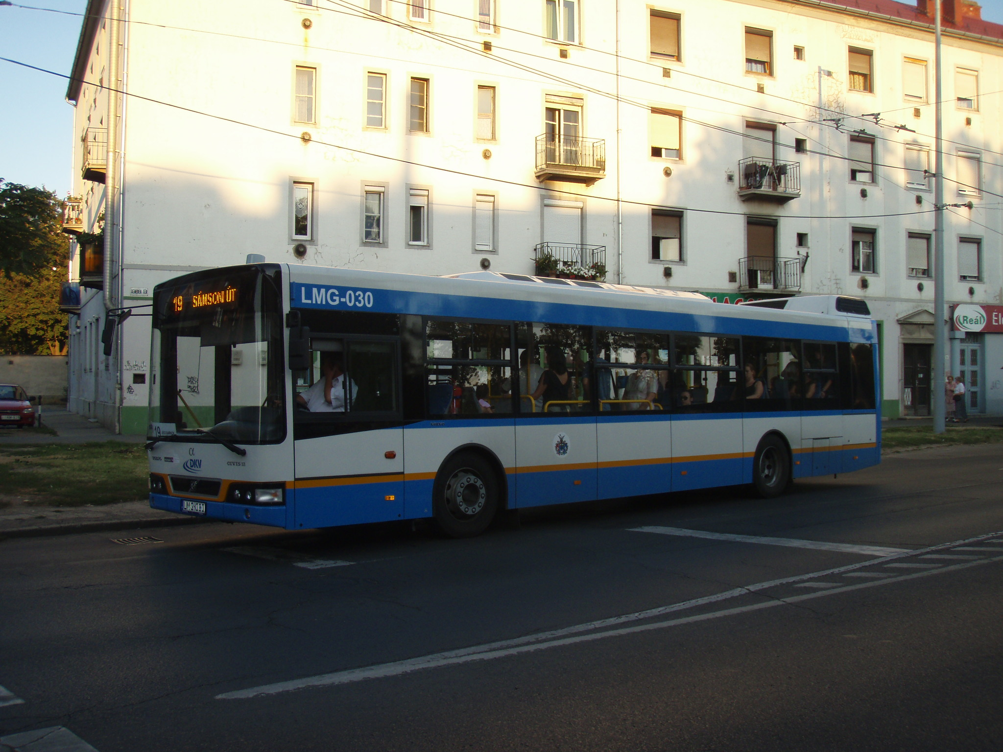 19-es busz (Debrecen)